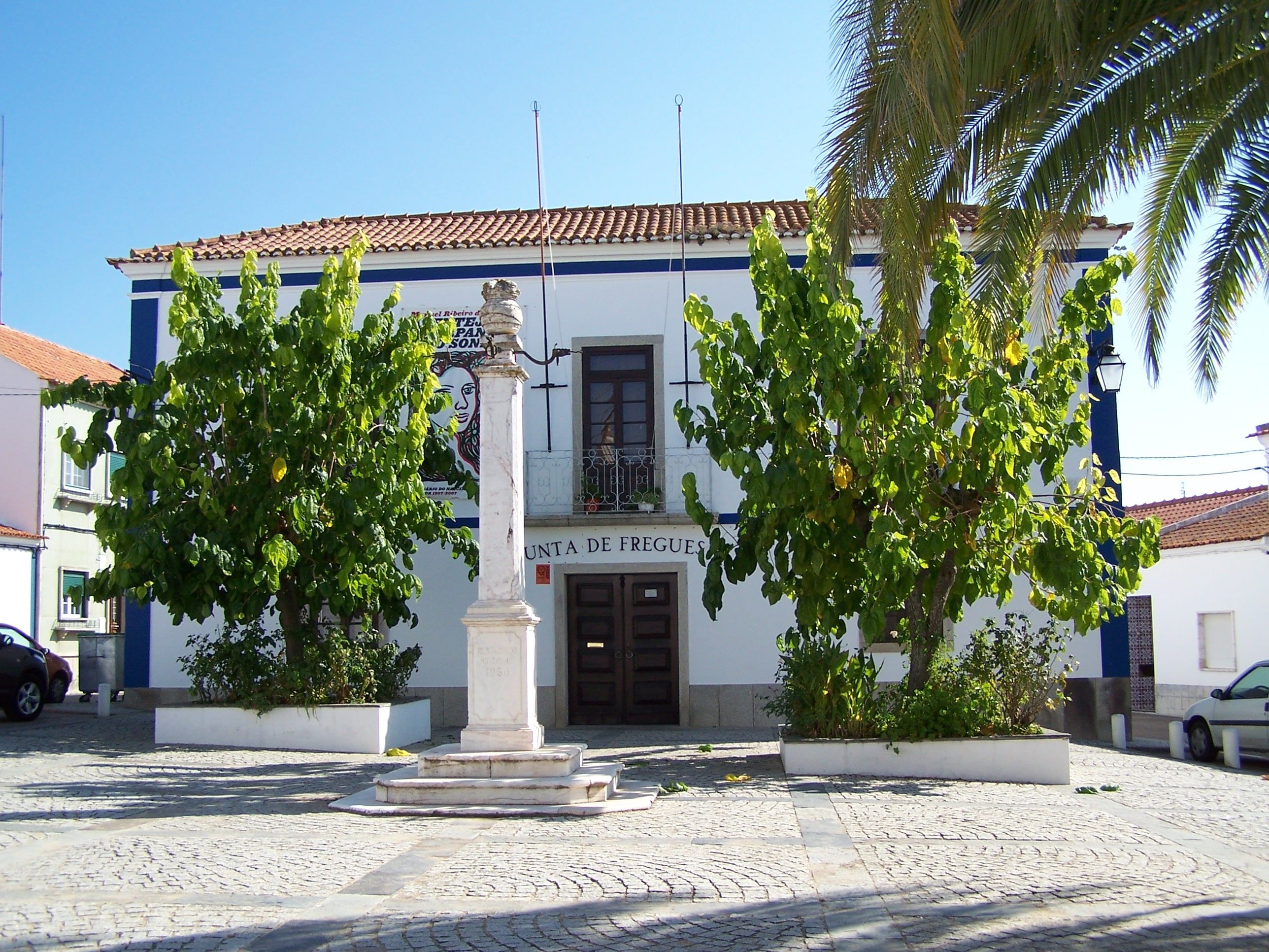 Cabeção- Edifício da Junta de Freguesia / Edifício da antiga Câmara